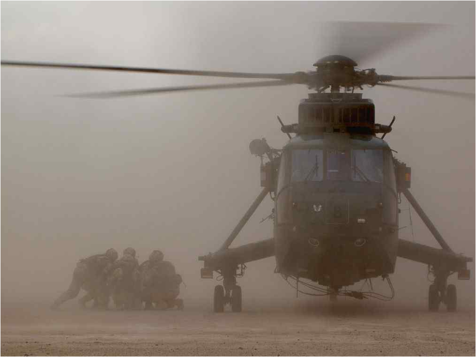 3rd Battalion Royal Anglian Regiment in Iraq 2005.